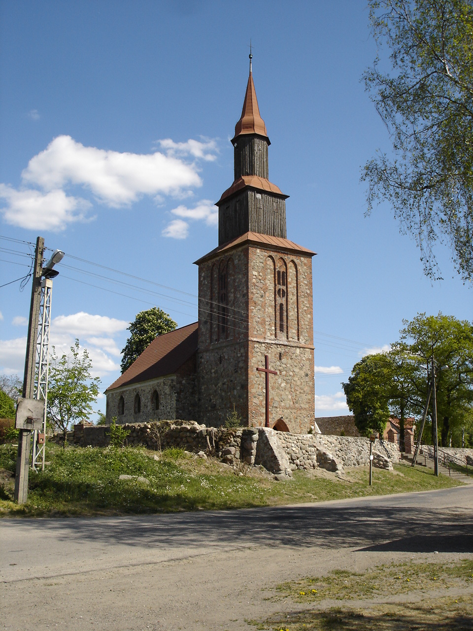 Poczernin (woj zachodniopomorskie) - kościół pw. św. Michała Archanioła (zabytek nr rejestr. 356)